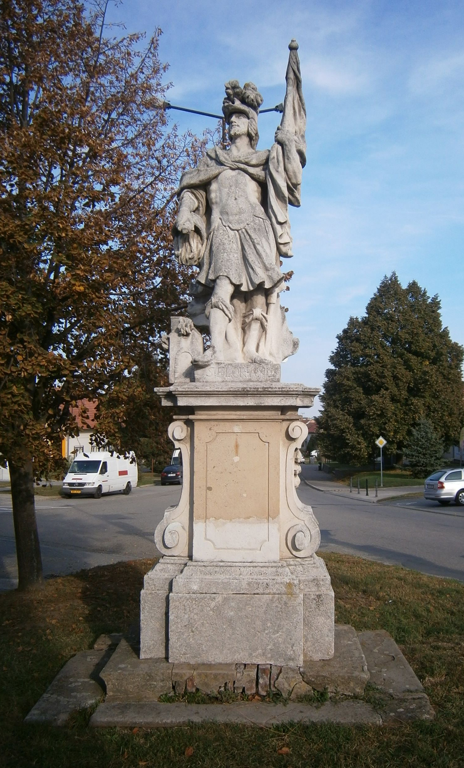 Socha sv. Floriána (Modřice), nám. Svobody, proti kapli sv. Václava, Modřice